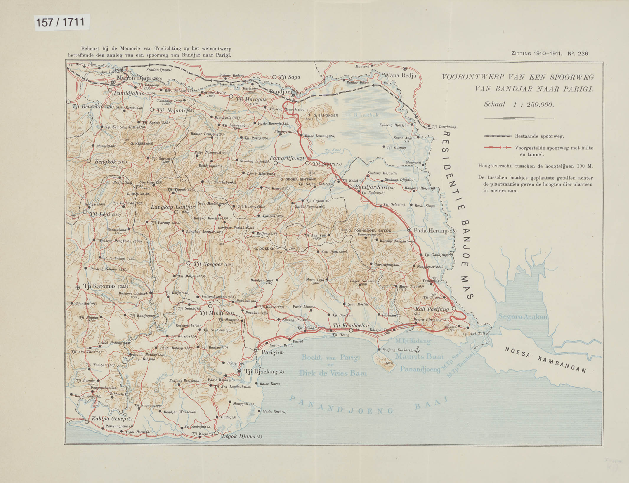 Voor de economische ontwikkeling van het zuid-oostelijk deel van de Preanger Regentschappen was een betere infrastructuur vereist. Met name tussen de als zeer vruchtbaar bekend staande laagvlakten van Parigi en de vlakte van Oost-Preanger werd een betere verbinding tot stand gebracht